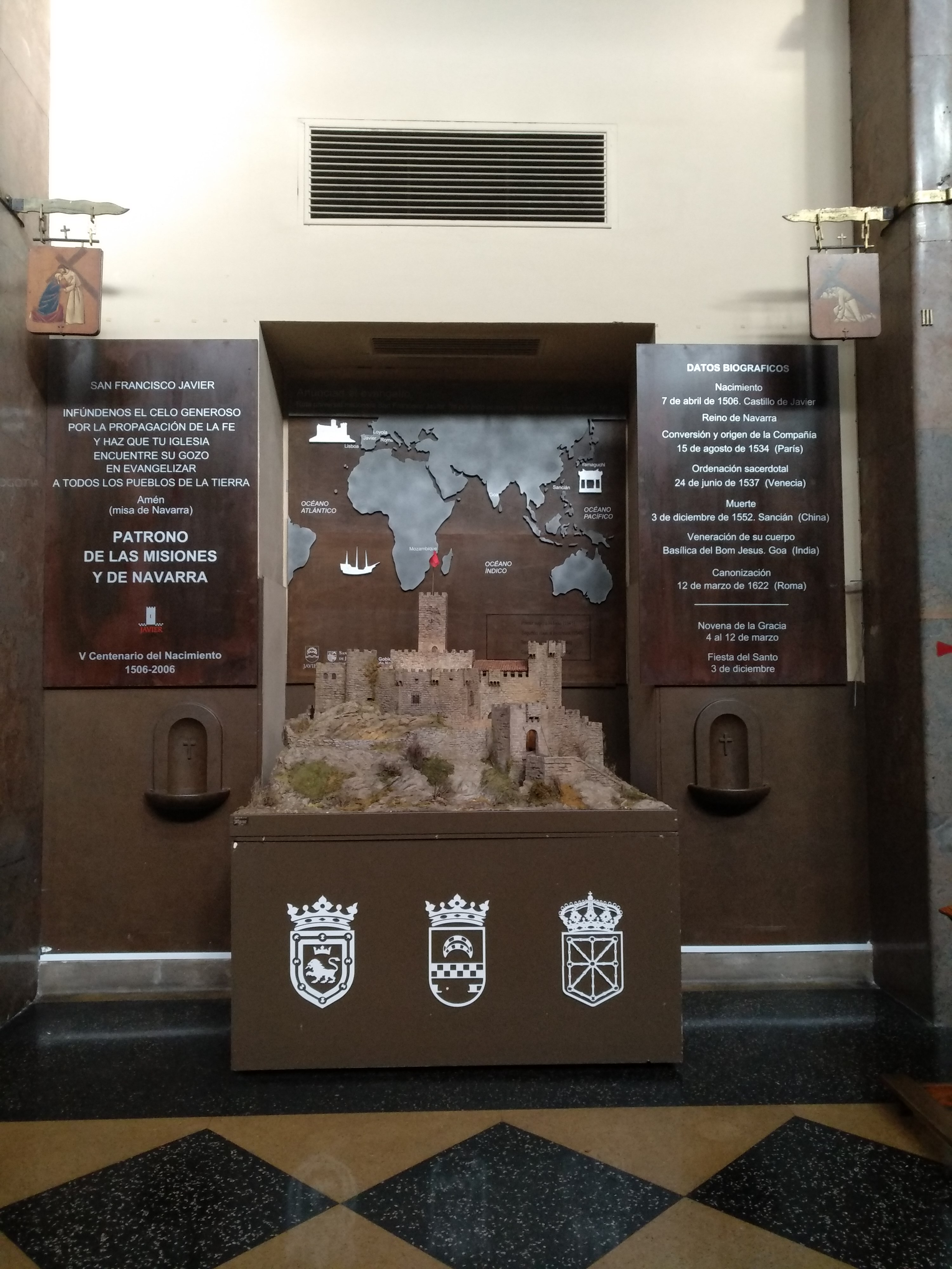 Iglesia de San Francisco Javier (Pamplona)